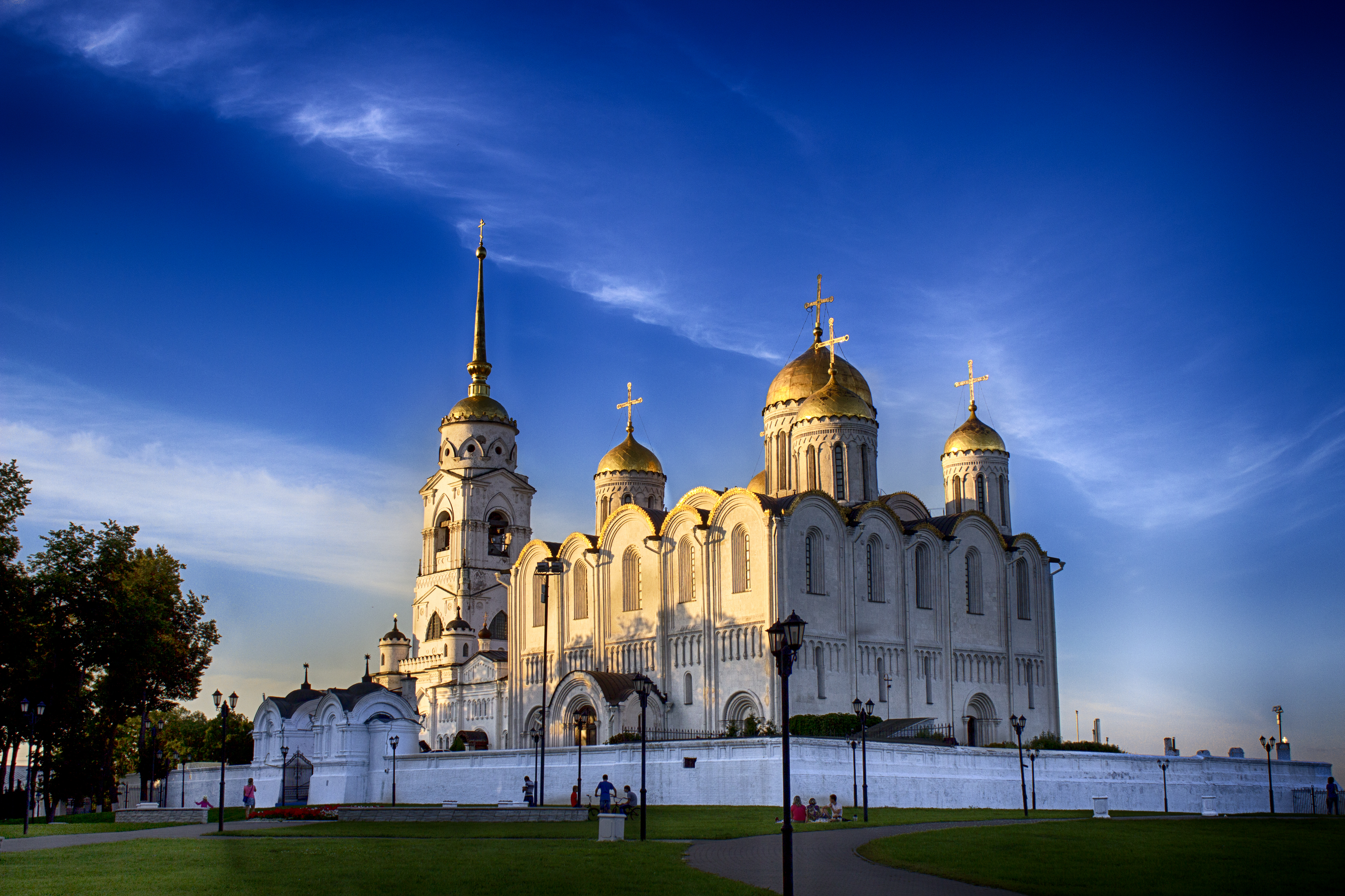 Собор Успенский (Владимирская область, Владимир, улица Большая Московская, 56)